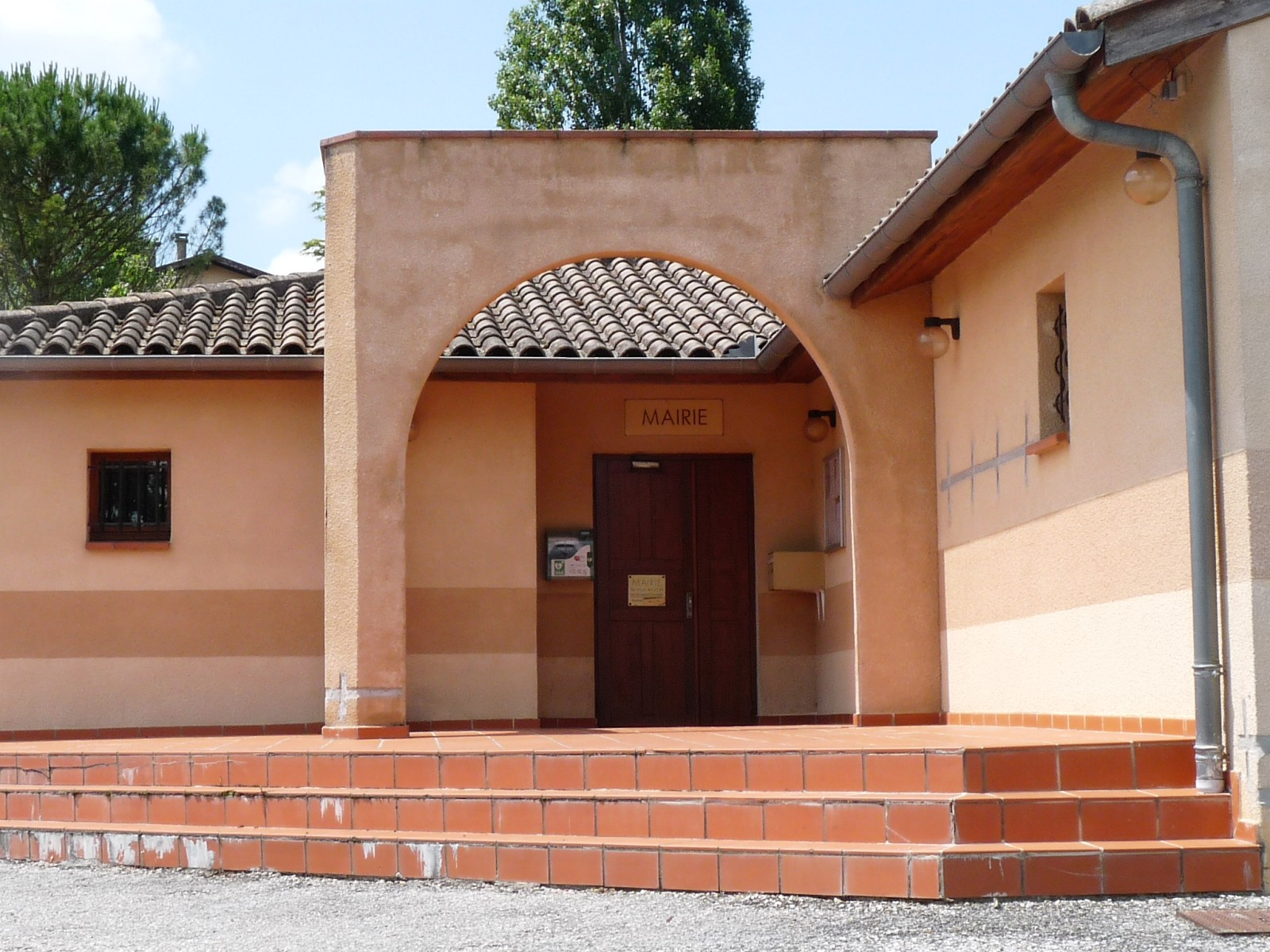 Mairie de Francarville, Haute-Garonne, France